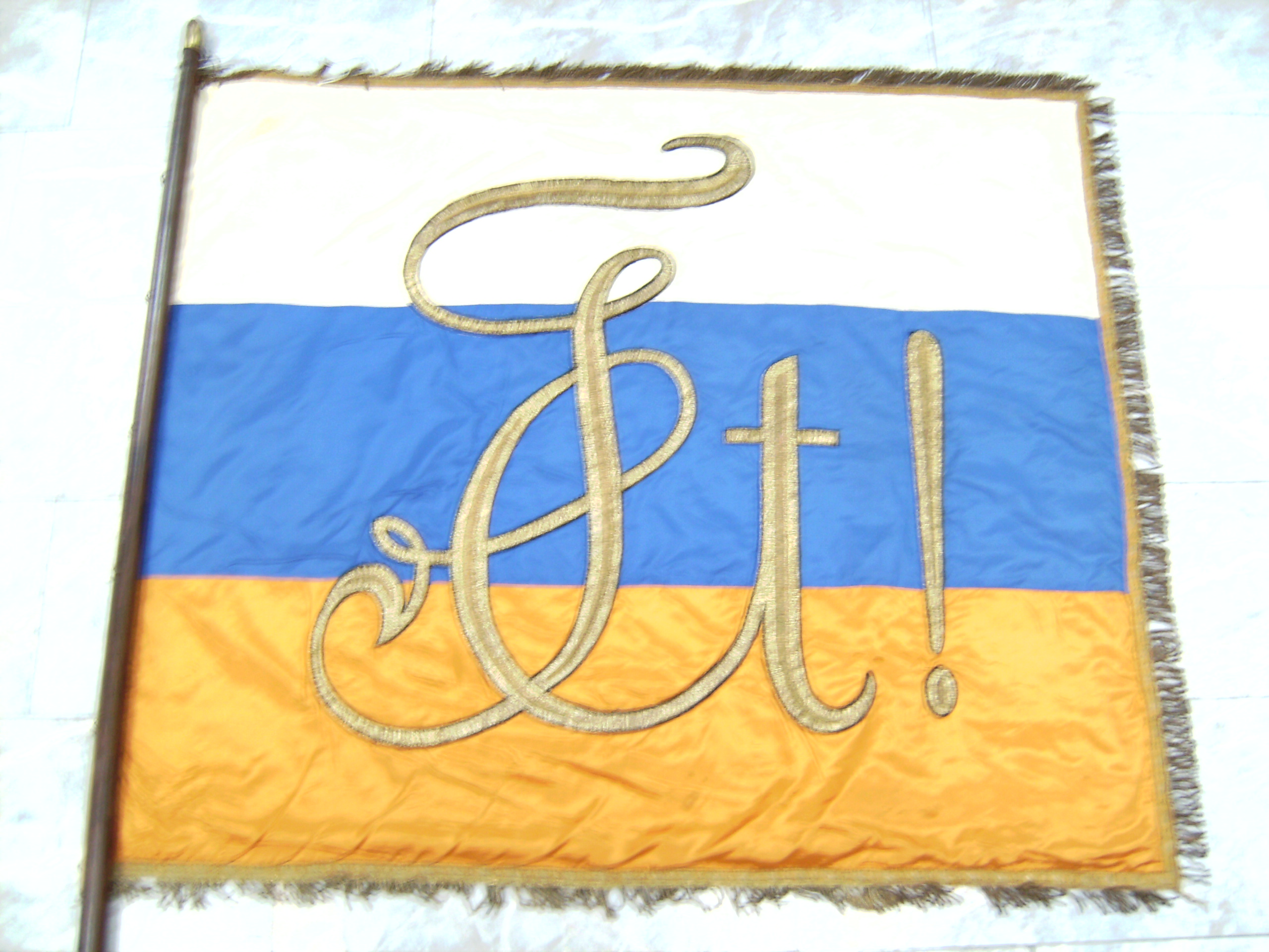 Fahne mit Zirkel der Unitas Stolzenfels